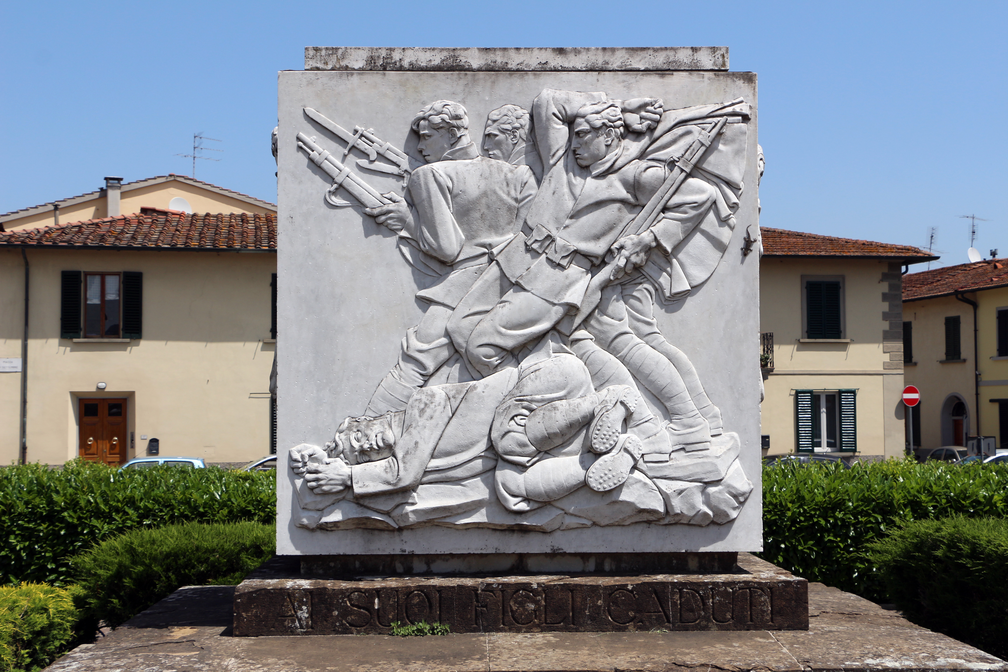 Monumento ai caduti This is a photo of a monument which is part of cultural heritage of Italy.